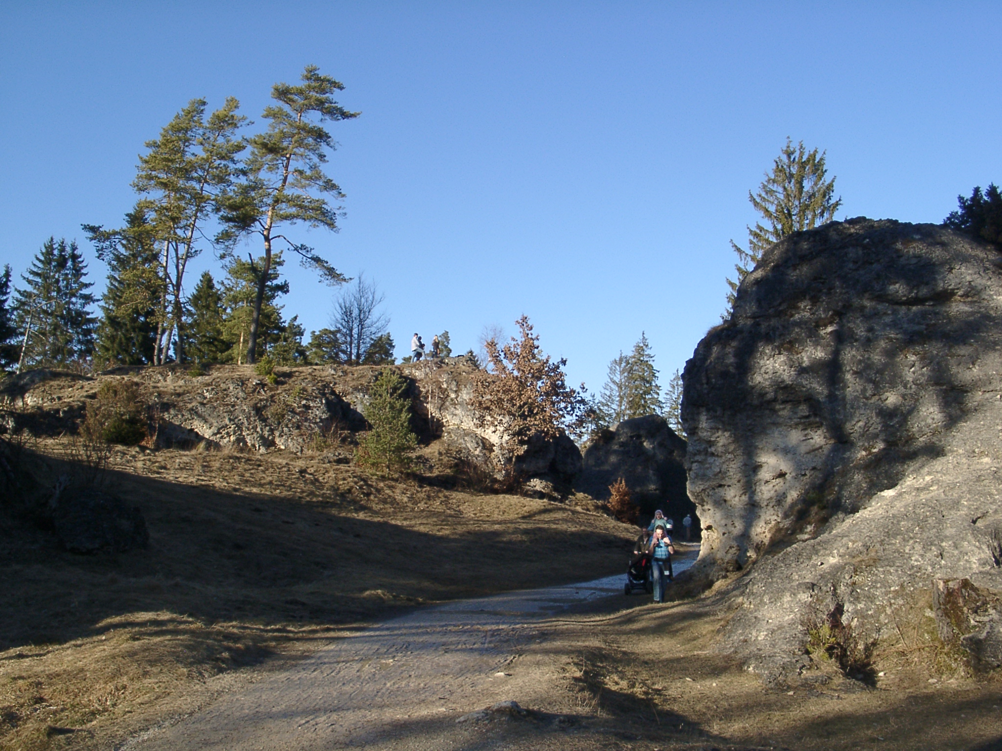 Felsenmeer Wental im Naturschutzgebiet „Wental mit Seitentälern und Feldinsel Klösterle“